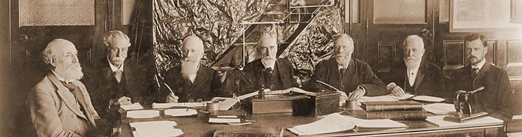 Reunião de diretores da Saint John Mining Company em um escritório em Londres